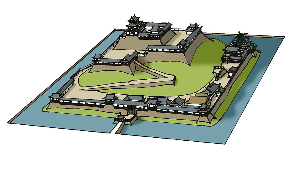 日本の城の、地形による分類である「平山城（ひらやましろ）」の近世期形状を簡略的に描いたもの。 全てがこのような形であるというわけではなく、また描かれた城はモデルであり、実在はしない。 参考文献:平井聖監修・三浦正幸ほか執筆『城 6 中国』毎日新聞社 1996年